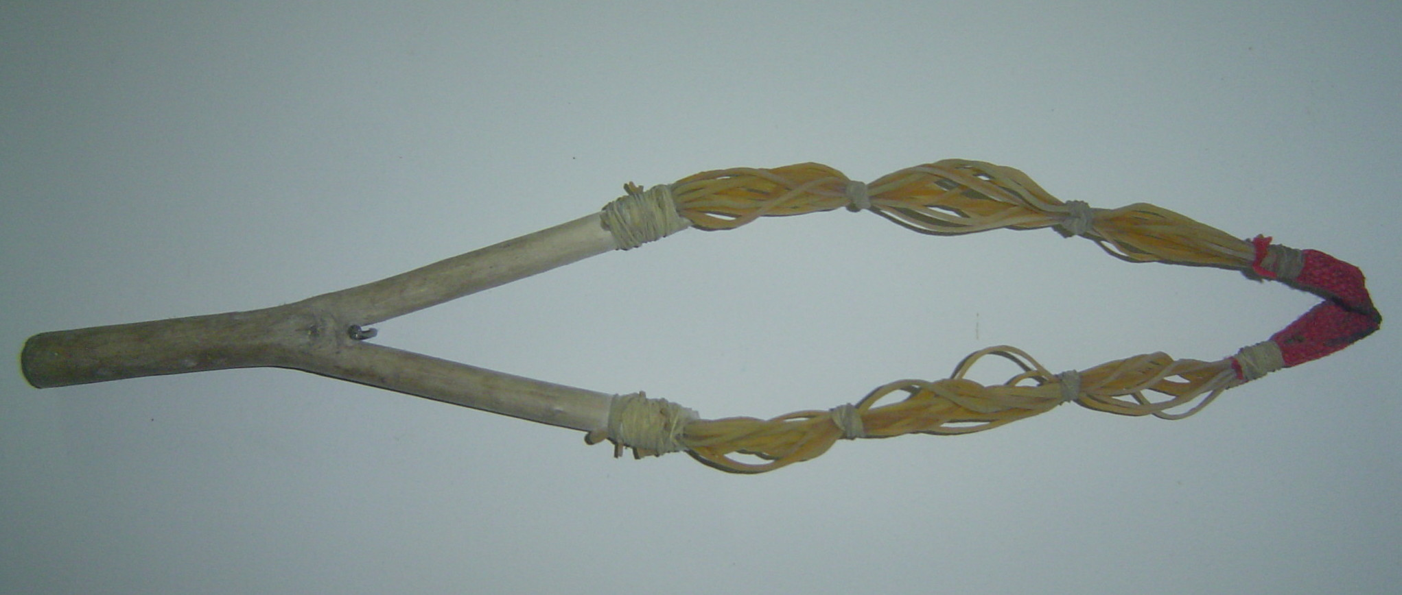 Súng cao su